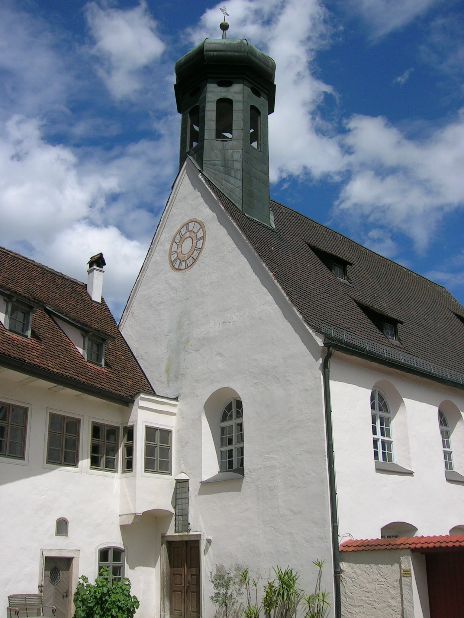 Kirche St. Anna in Marienstein, Eichstätt